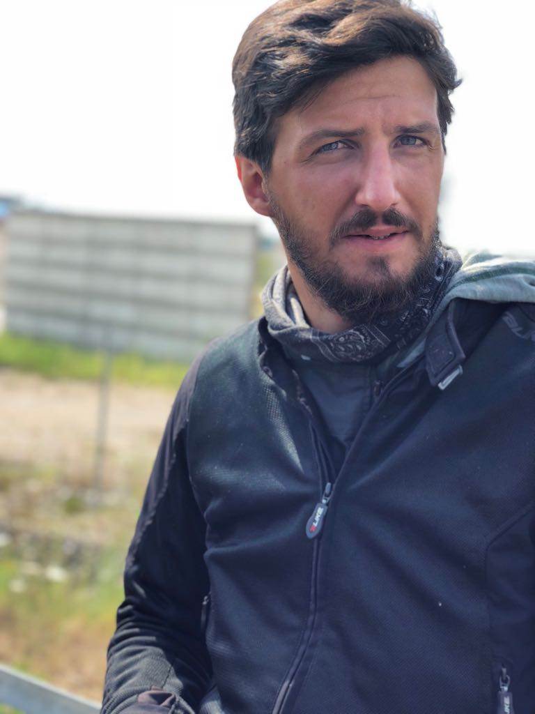 Carlo Sciaccaluga